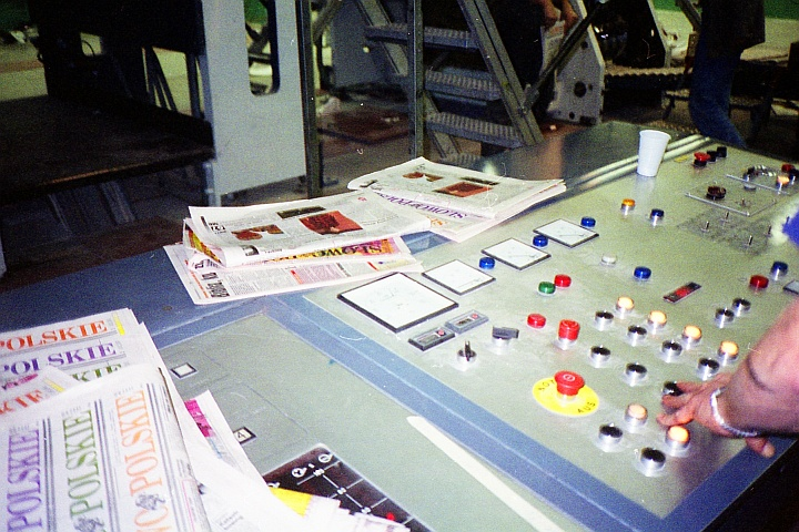 Pulpit offsetowej maszyny drukarskiej "Słowa Polskiego" we Wrocławiu na Swojczycach (typ Roland MAN Uniman 4/2) podczas ostatnich testów przed podjęciem regularnej produkcji gazet